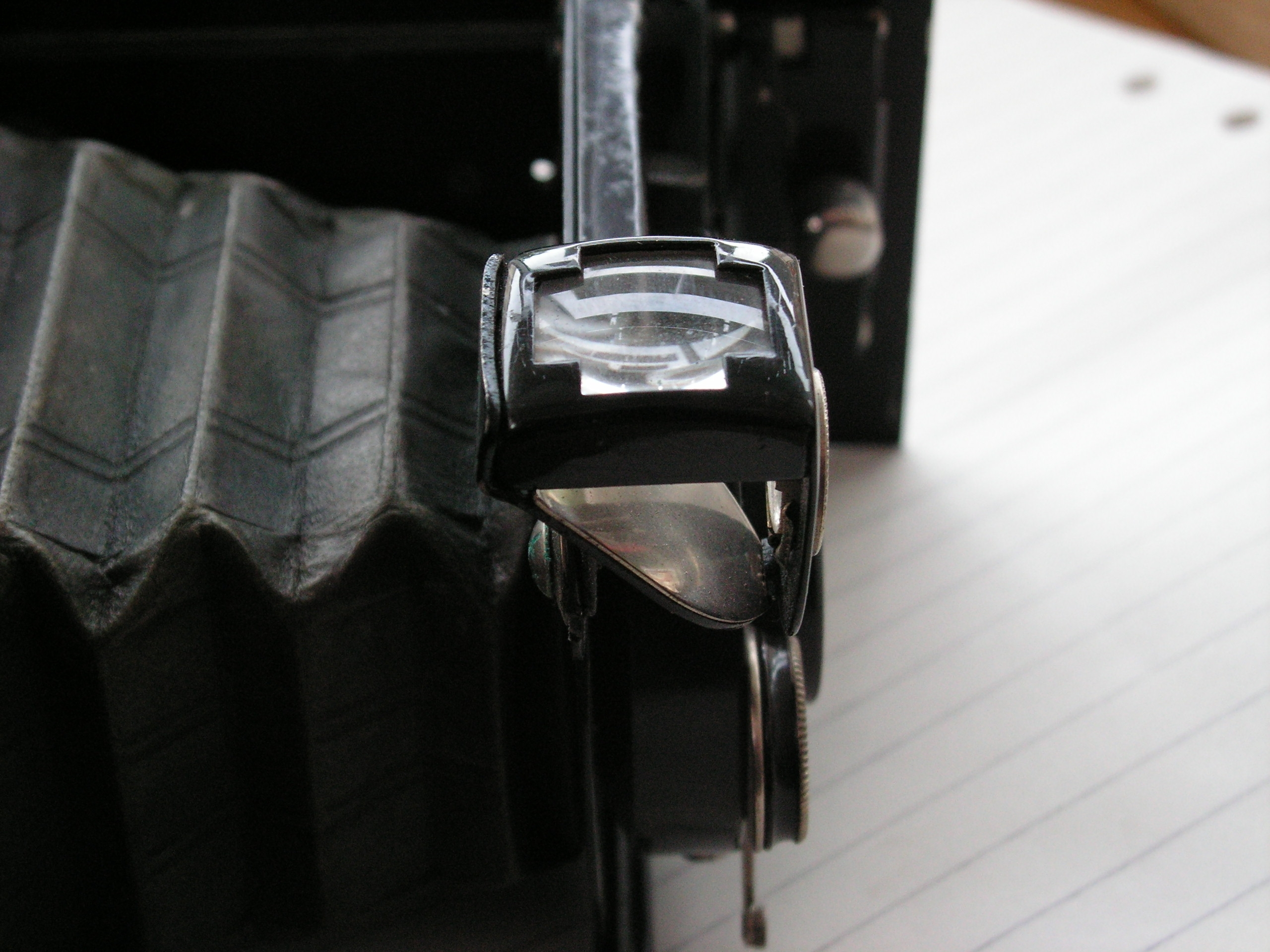 Stefan Linder Foto BrilliantsökareStefan.lila 10 augusti 2006 kl. 11.51 (CEST)